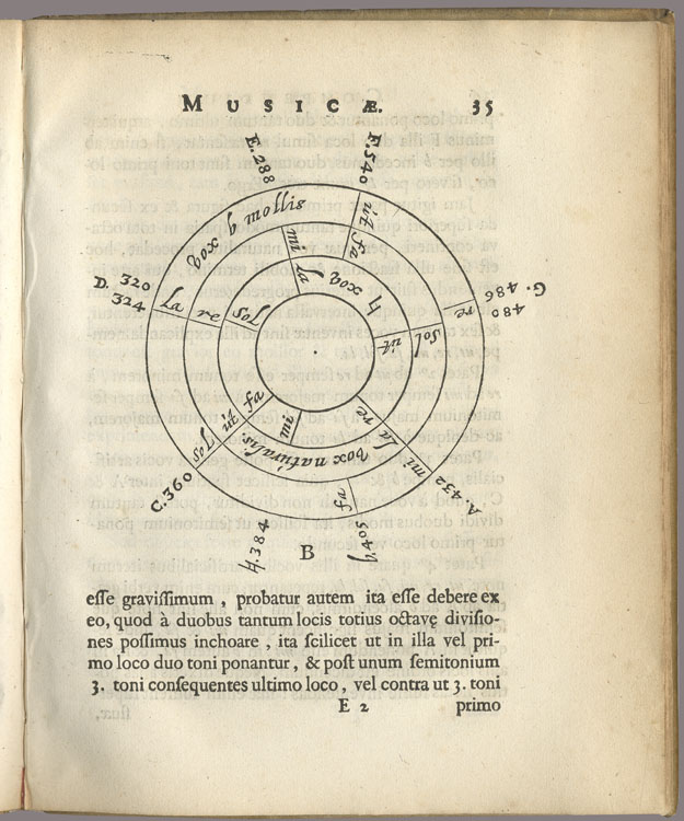 Compendium musicae Edizione: Utrecht, Gesberti a Zÿll & Theodori ab Ackersdÿck, 1650